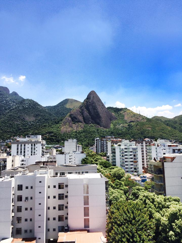 Foto do Pico do Papagaio